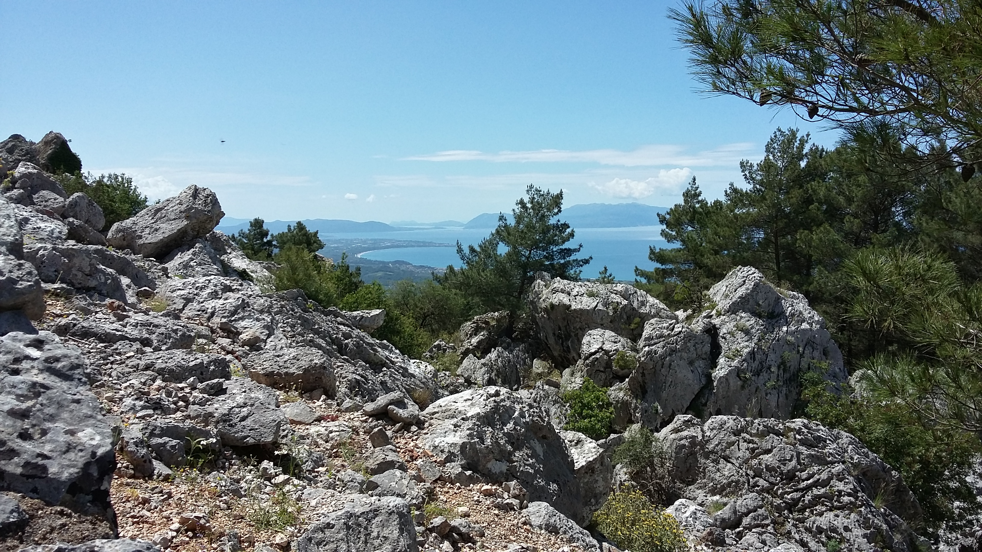 Τα βράχια όπου κατέπεσαν οι Σουλιώτισσες με τα παιδιά τους